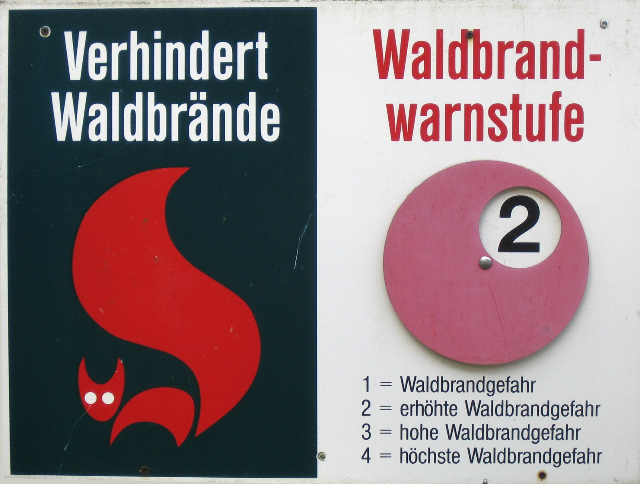 Waldbrand-Warntafel (Mecklenburg-Vorpommern)